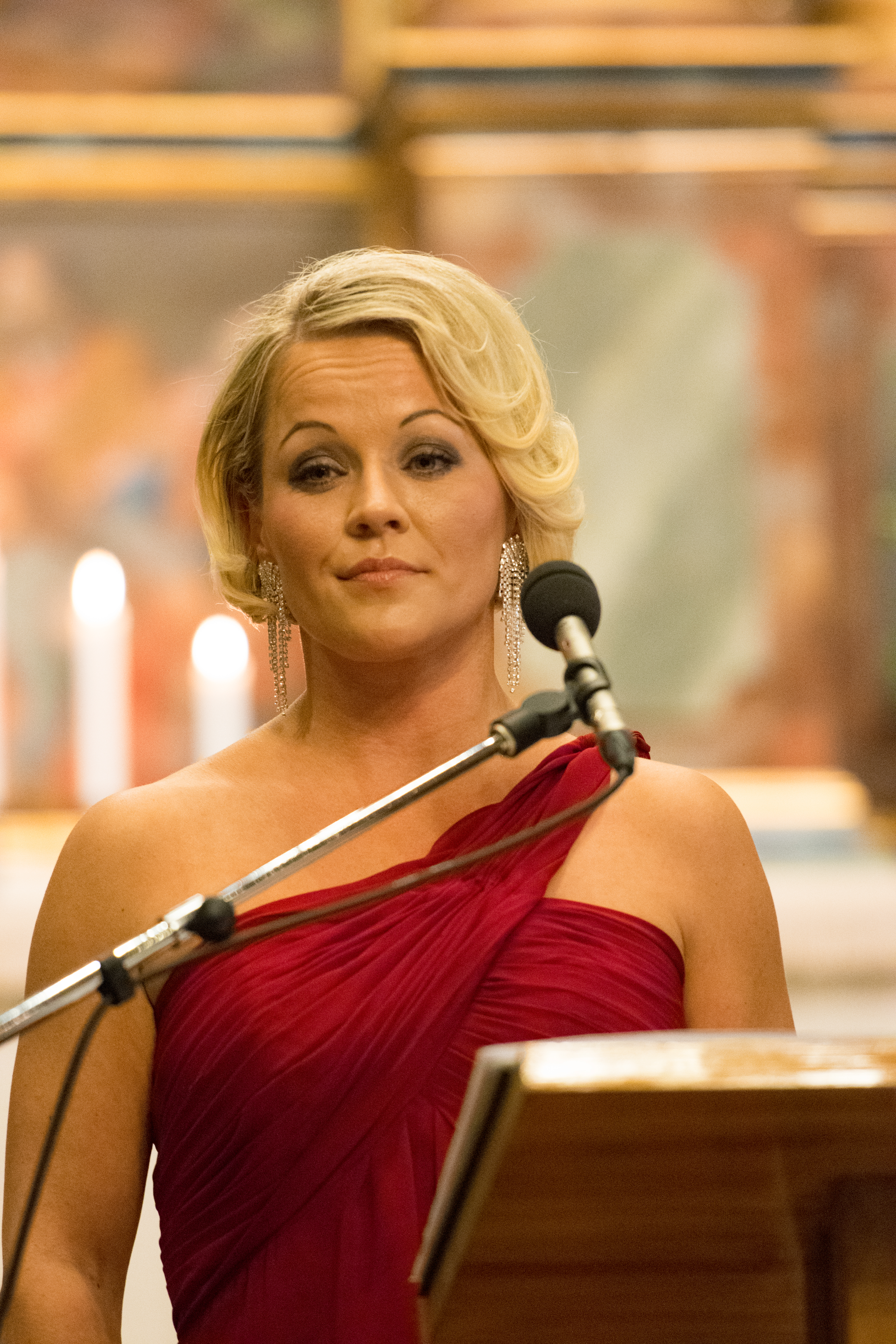 Heidi Pakarinen suomalainen laulaja